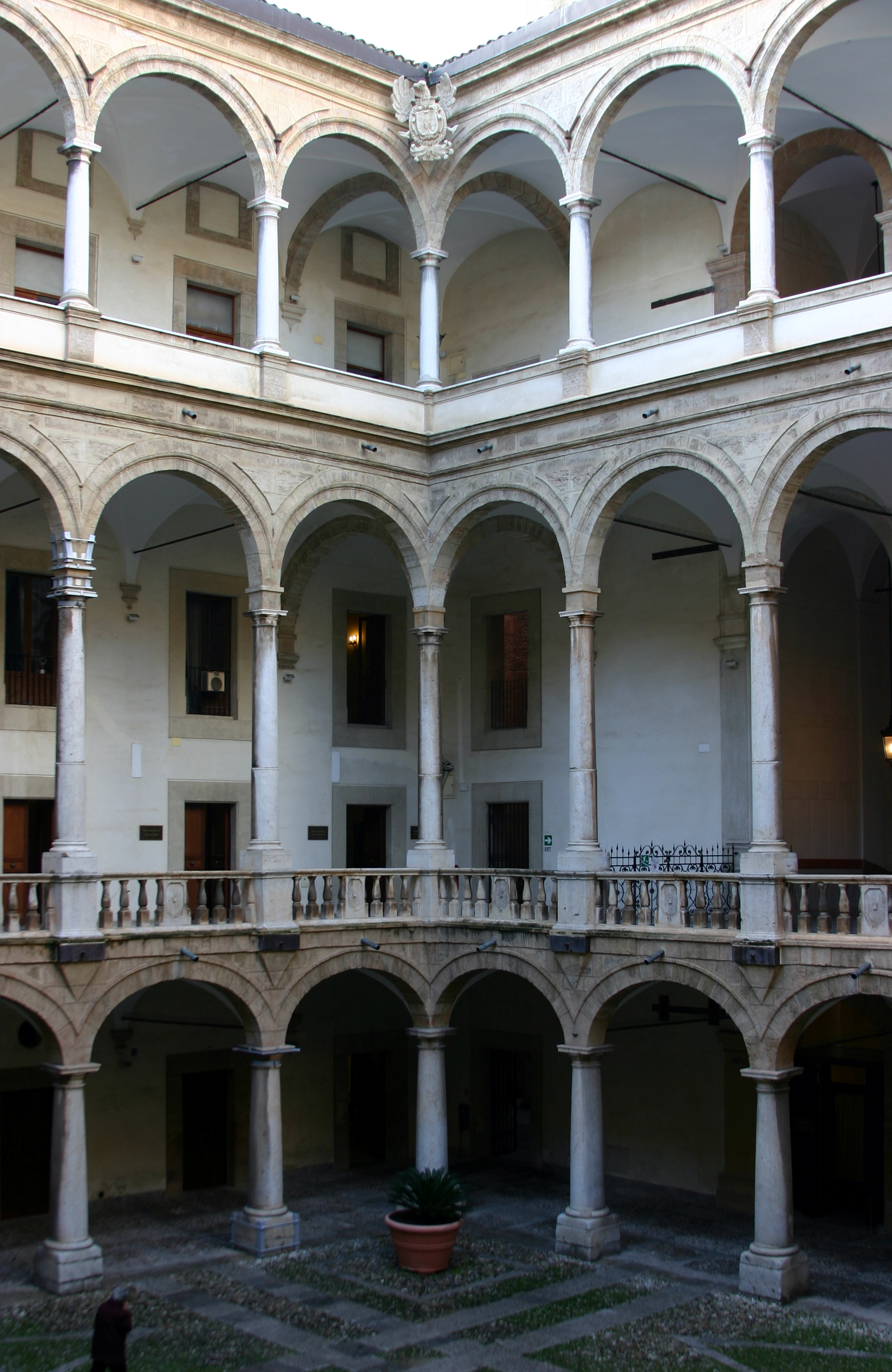 Palazzo dei Normani